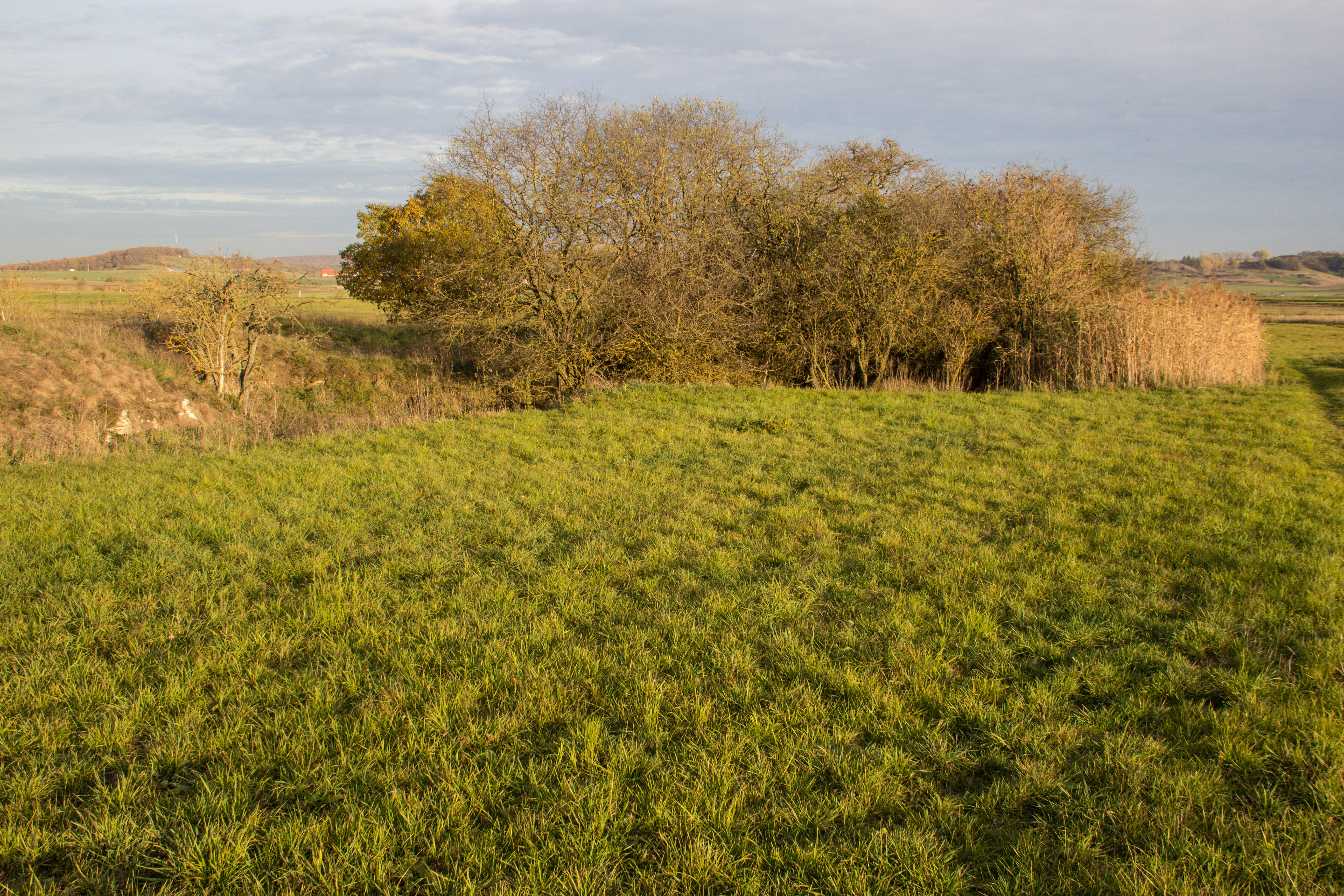 Geotop, Gipshügel Sieben Buckel, Markt Nordheim, Landschaft